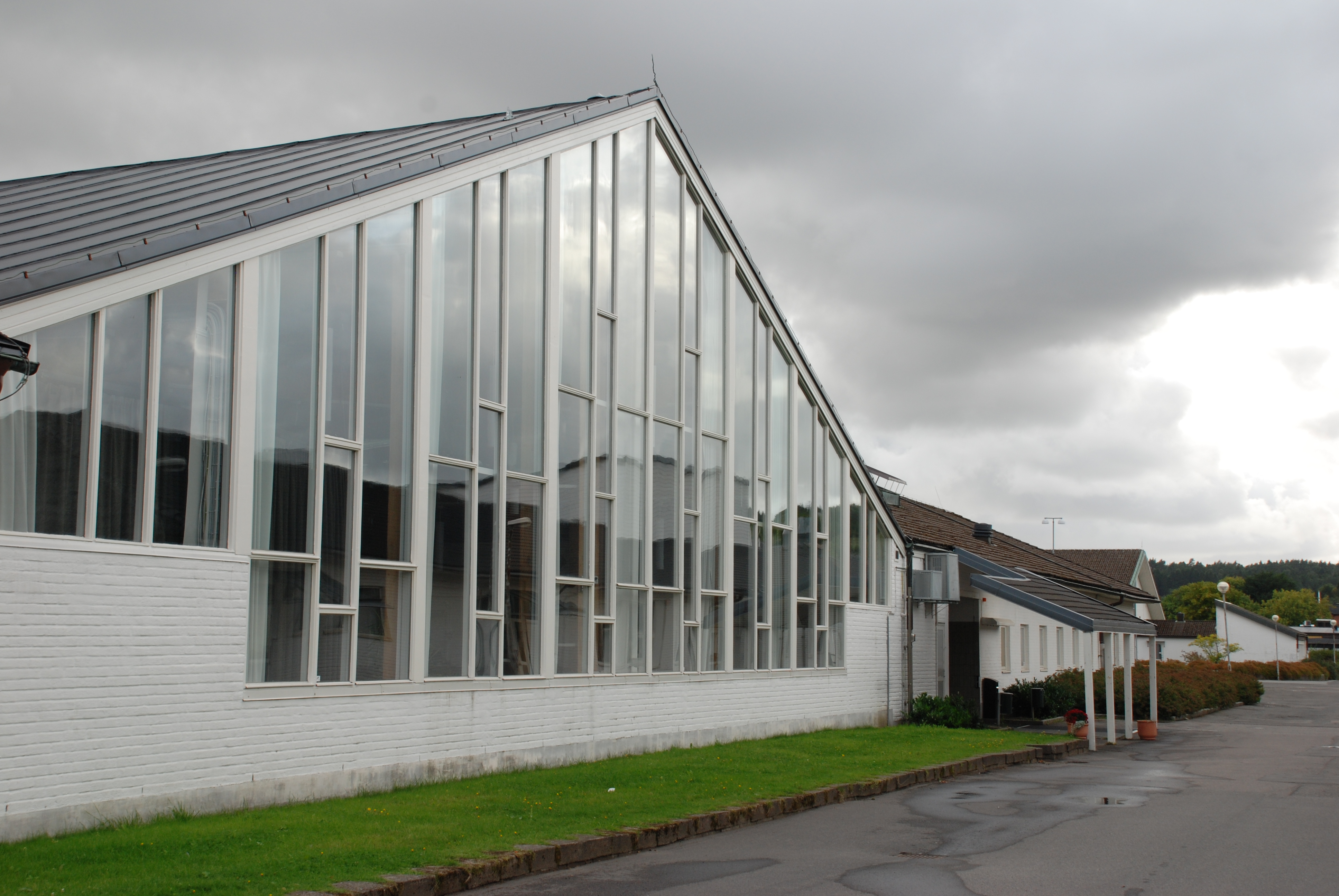 Fässbergsgymnasiet i Mölndal. Aulan.